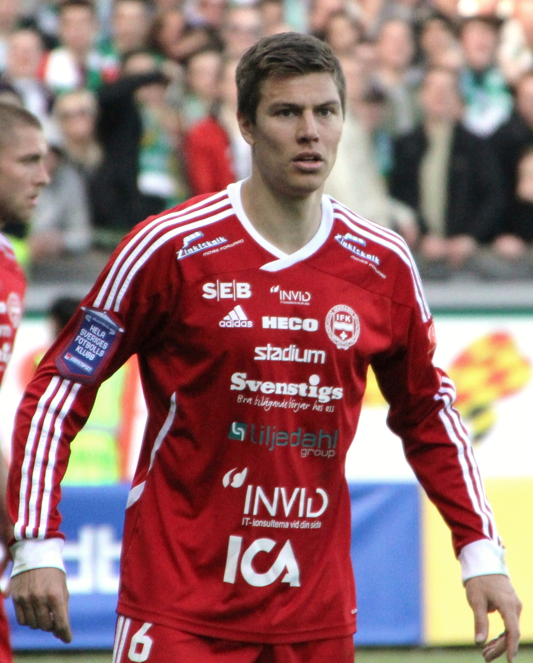 IFK Värnamos Martin Claesson.